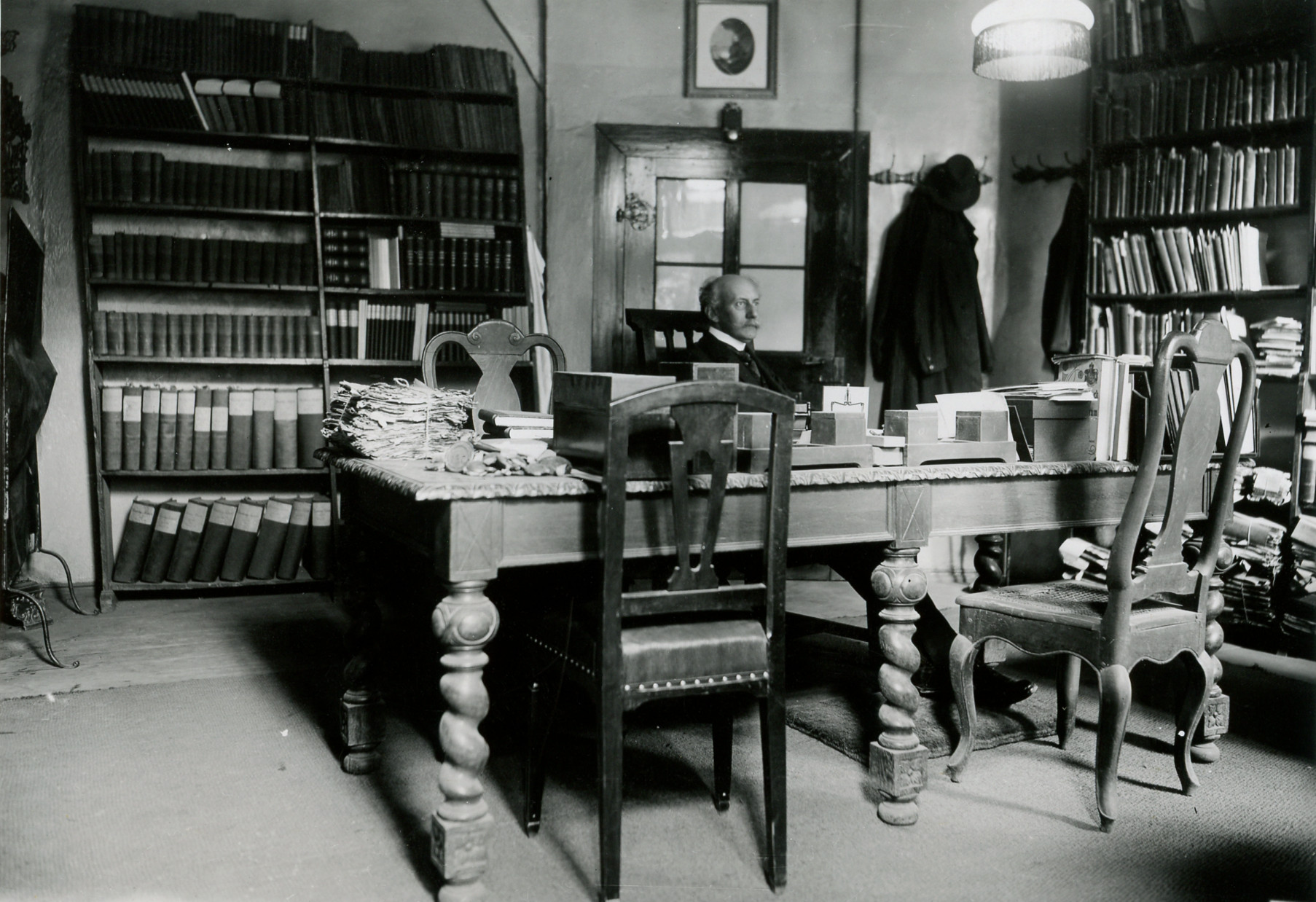 Schloss Detmold: Archiv mit Archivrat Dr. Hans Kiewning